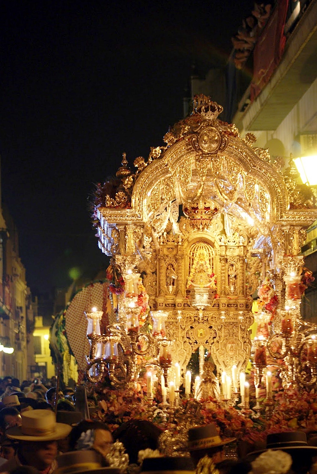 simpecado del rocio de la macarena